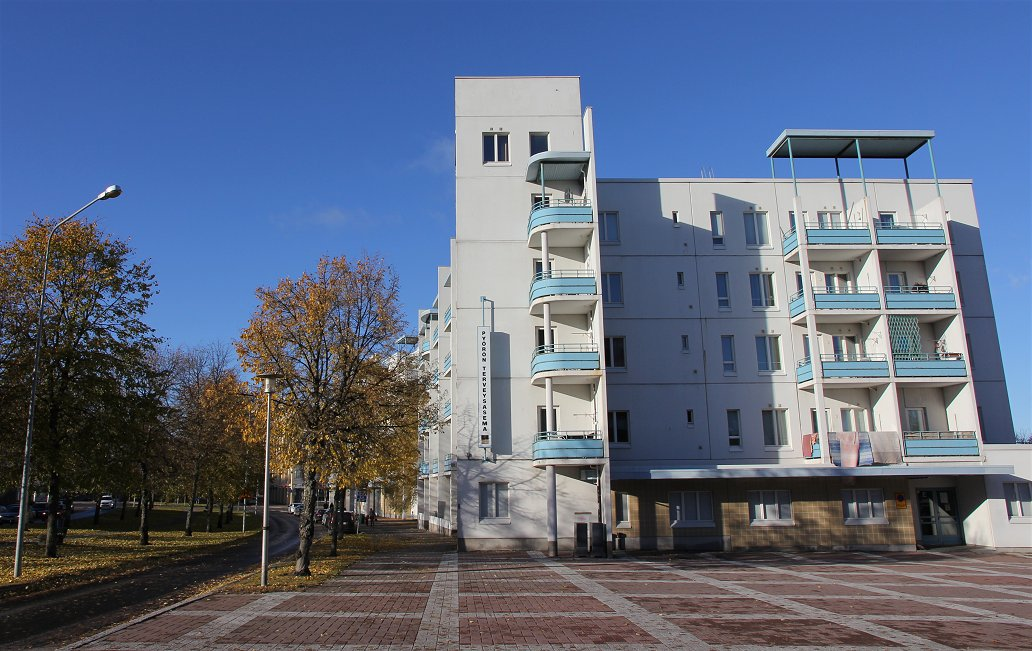 Pyörön terveysasema vuonna 1982 valmistuneen Vapauden aukion laidalla Kuopion Petosen (kaupunginosajaottelun mukaan Litmasen kaupunginosan) keskustassa.